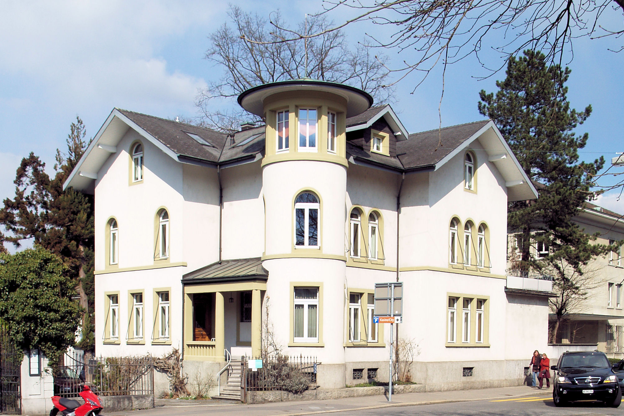 Das Haus Nummer 7, in der Laurezenvorstadt (Aarau)